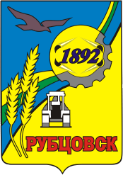 Герб г. Рубцовска